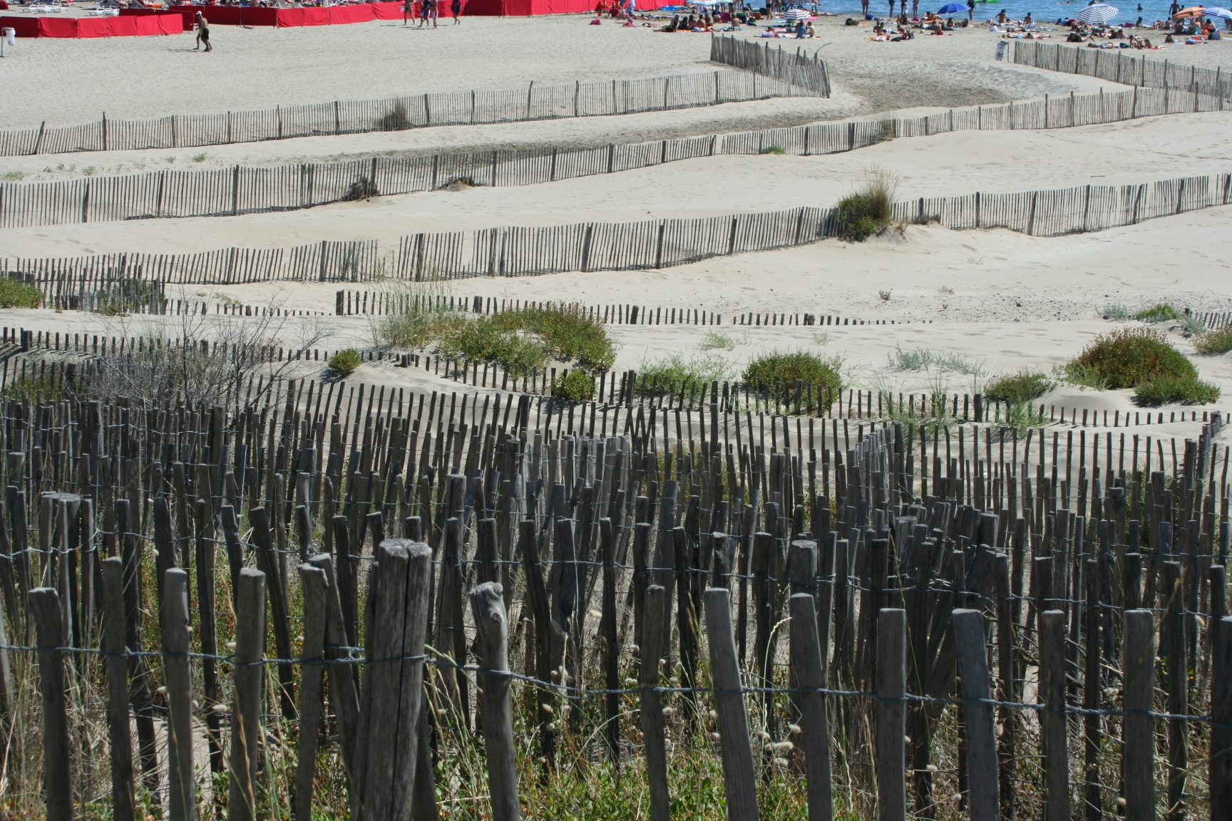 réseau de ganivelles (lutte contre l'érosion éolienne) sur la plage Richelieu au Cap d'Agde